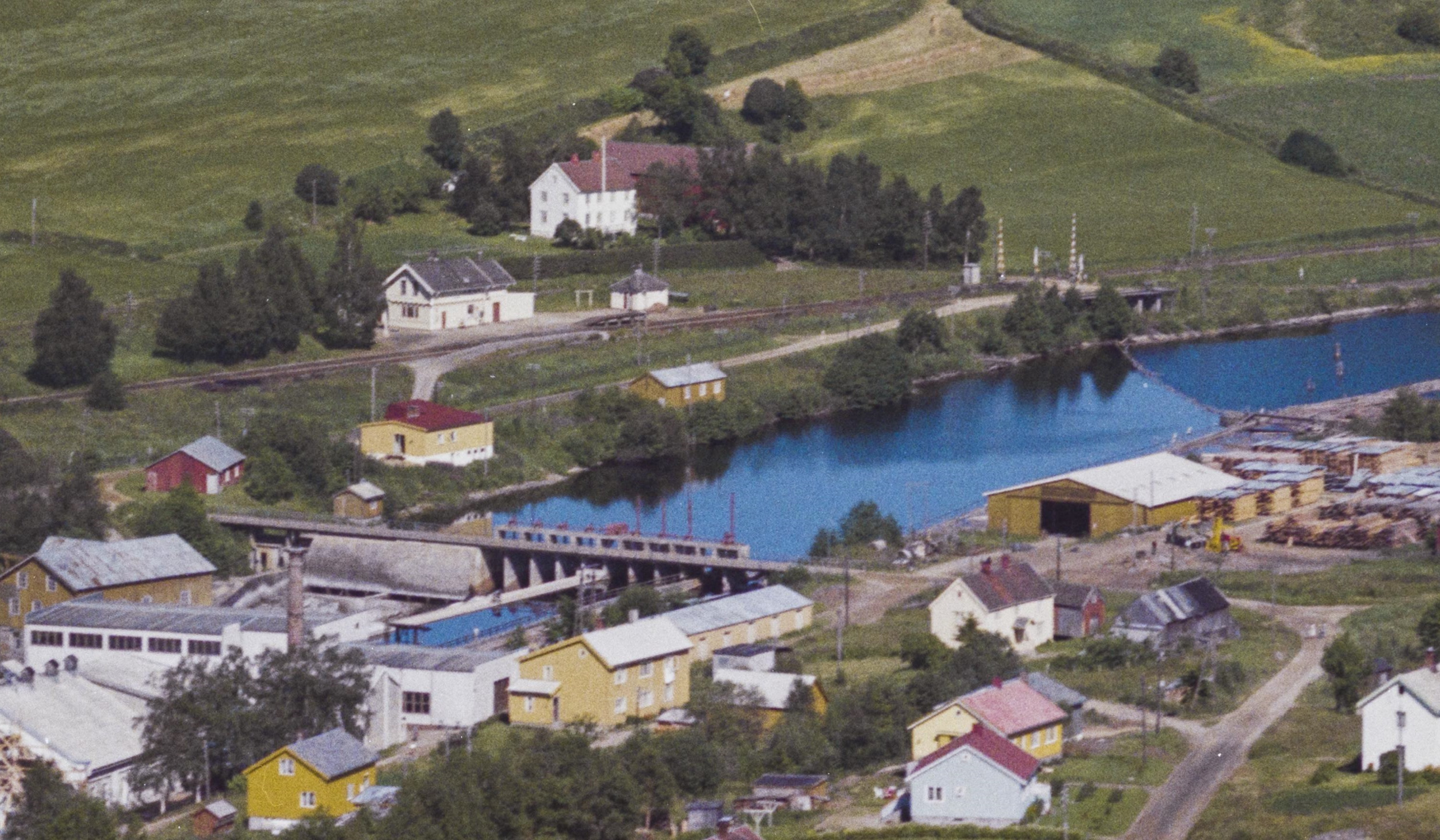 Byafossen stoppested på Nordlandsbanen. Foto: Widerøes Flyveselskap, fra Nasjonalbibliotekets samling.